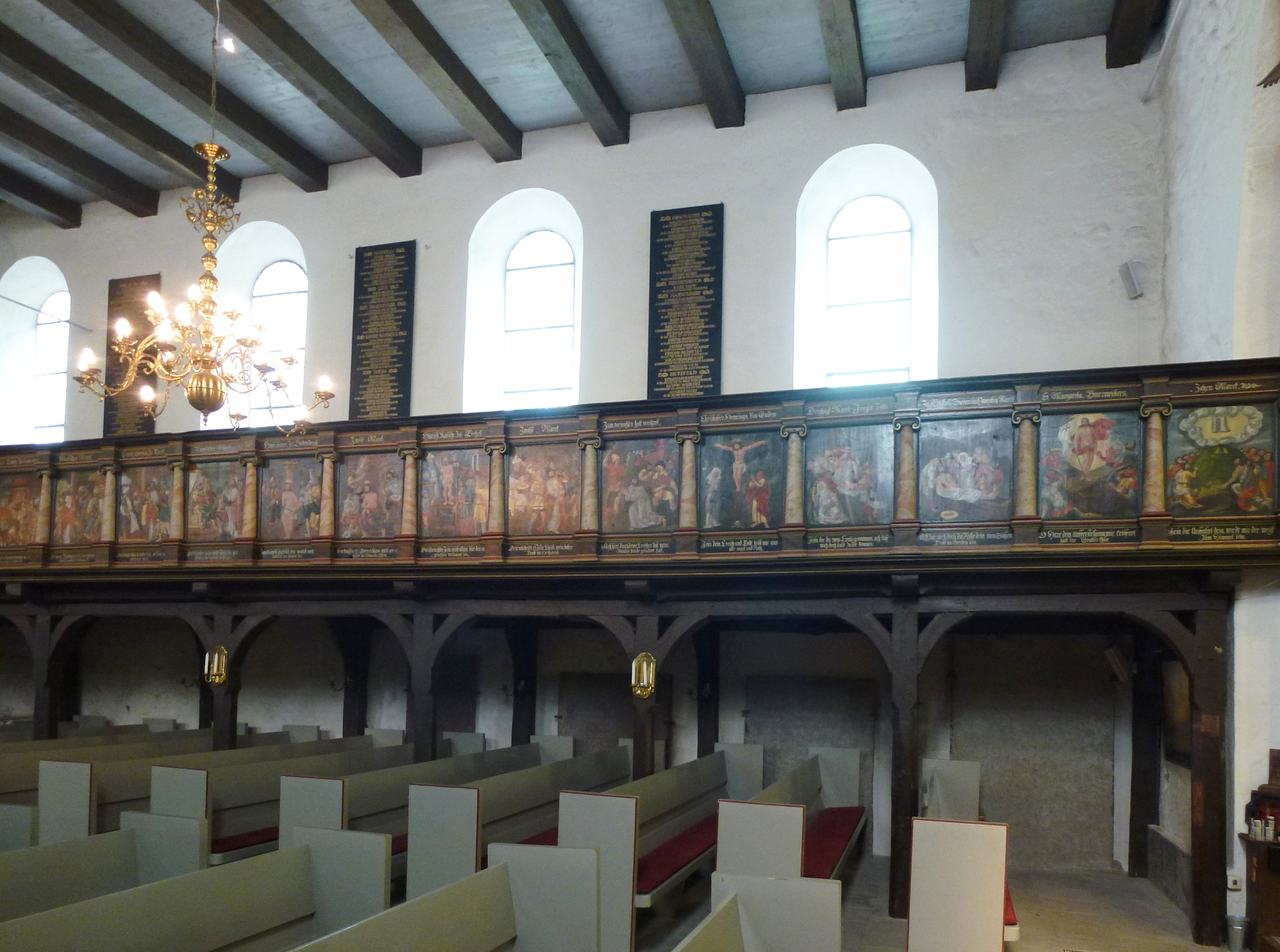 Petrikirche in Bosau, Empore